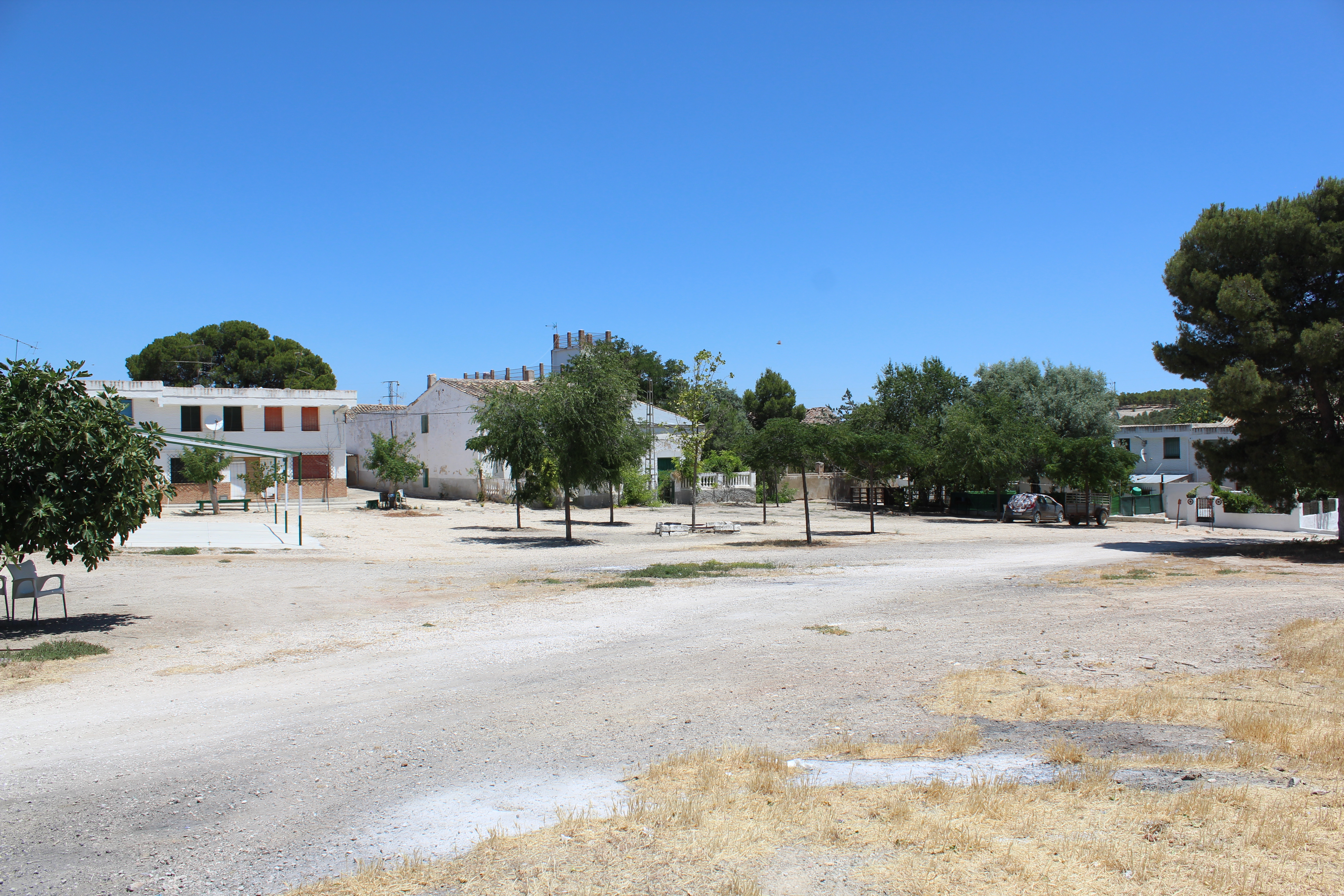 Vista de la cortijada o aldea de la Estación de Huesa.